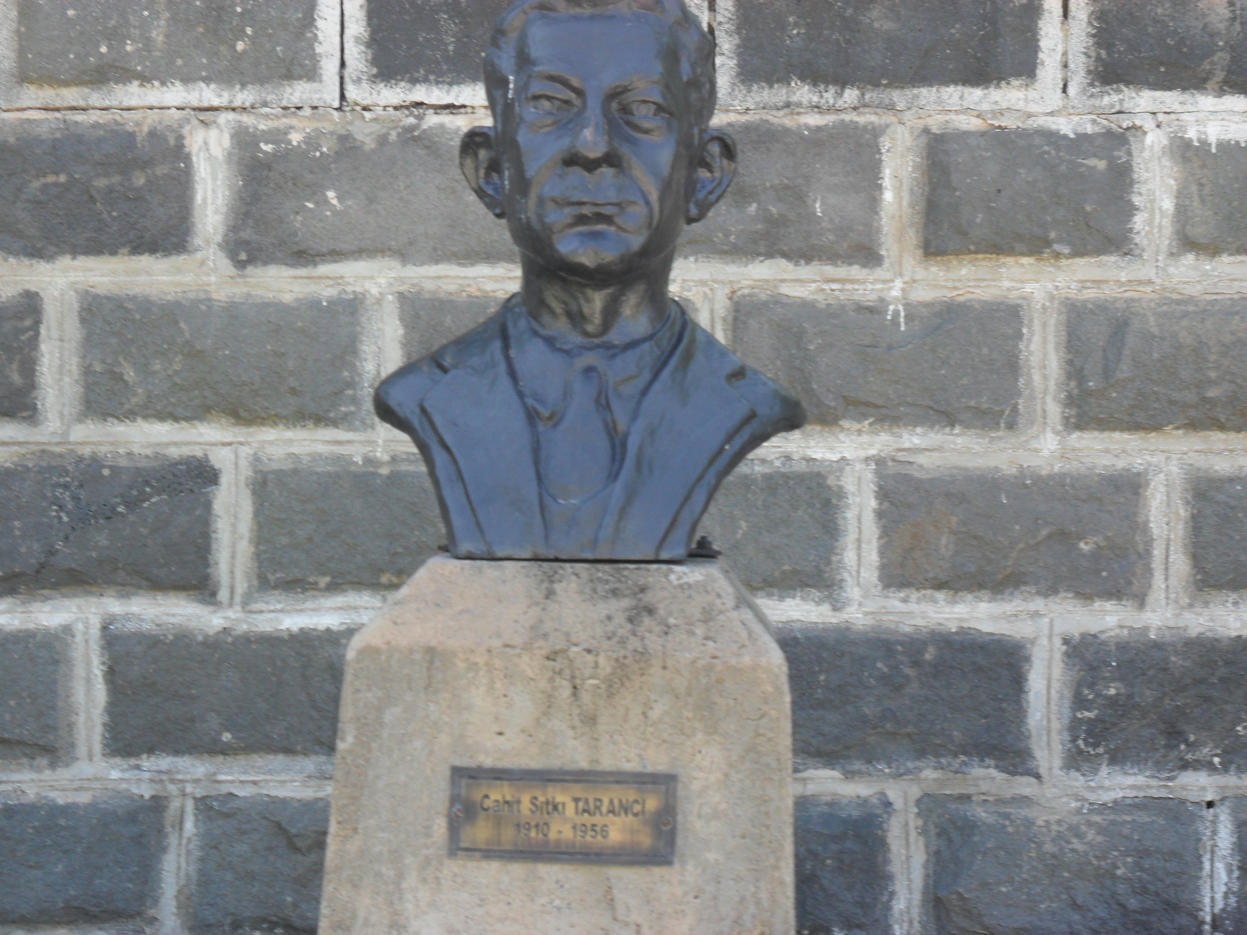 Gazi Köşkü'ndeki Cahit Sıtkı Tarancı'nın büstü, Diyarbakır.